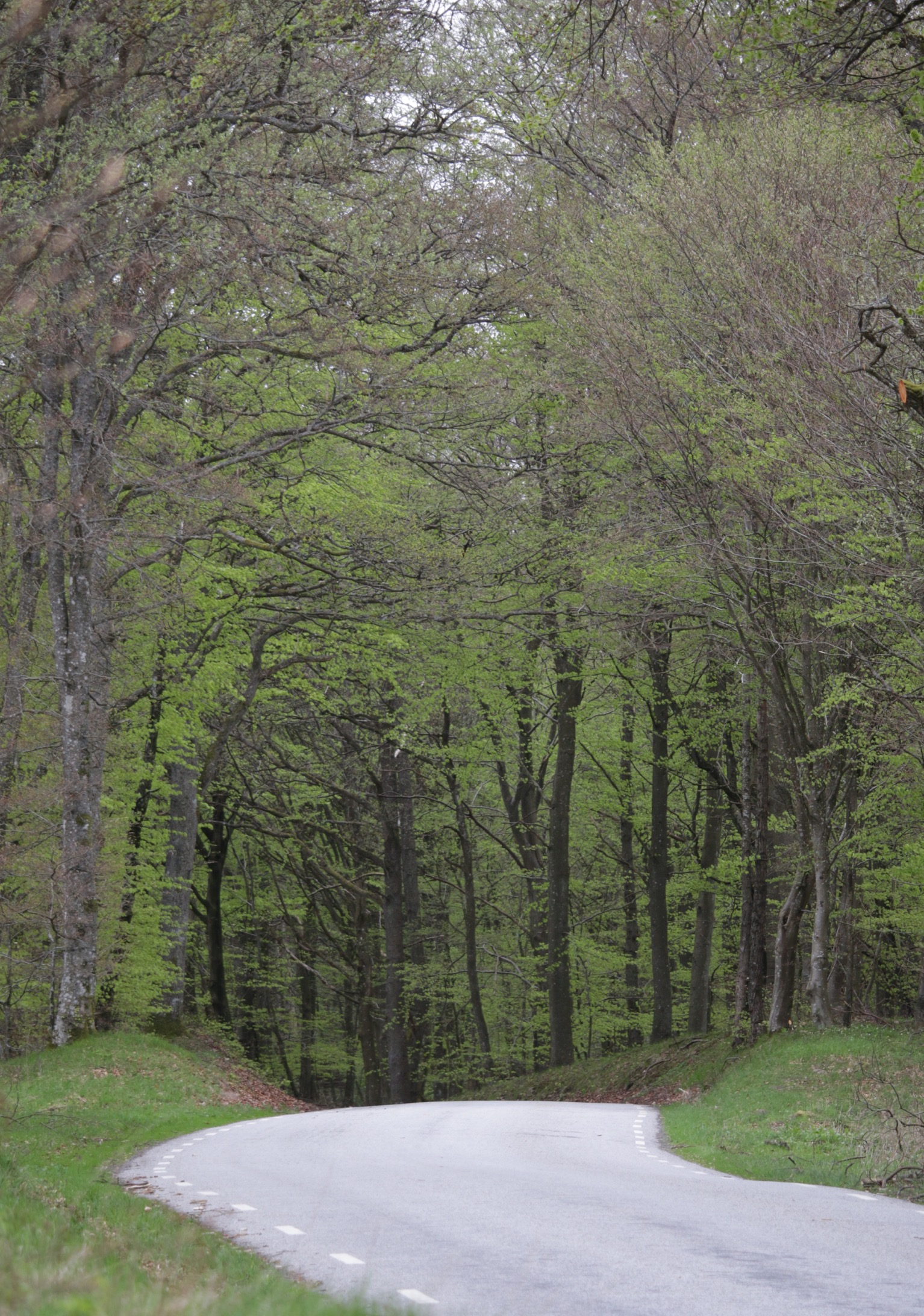 Bokskog i Häckeberga